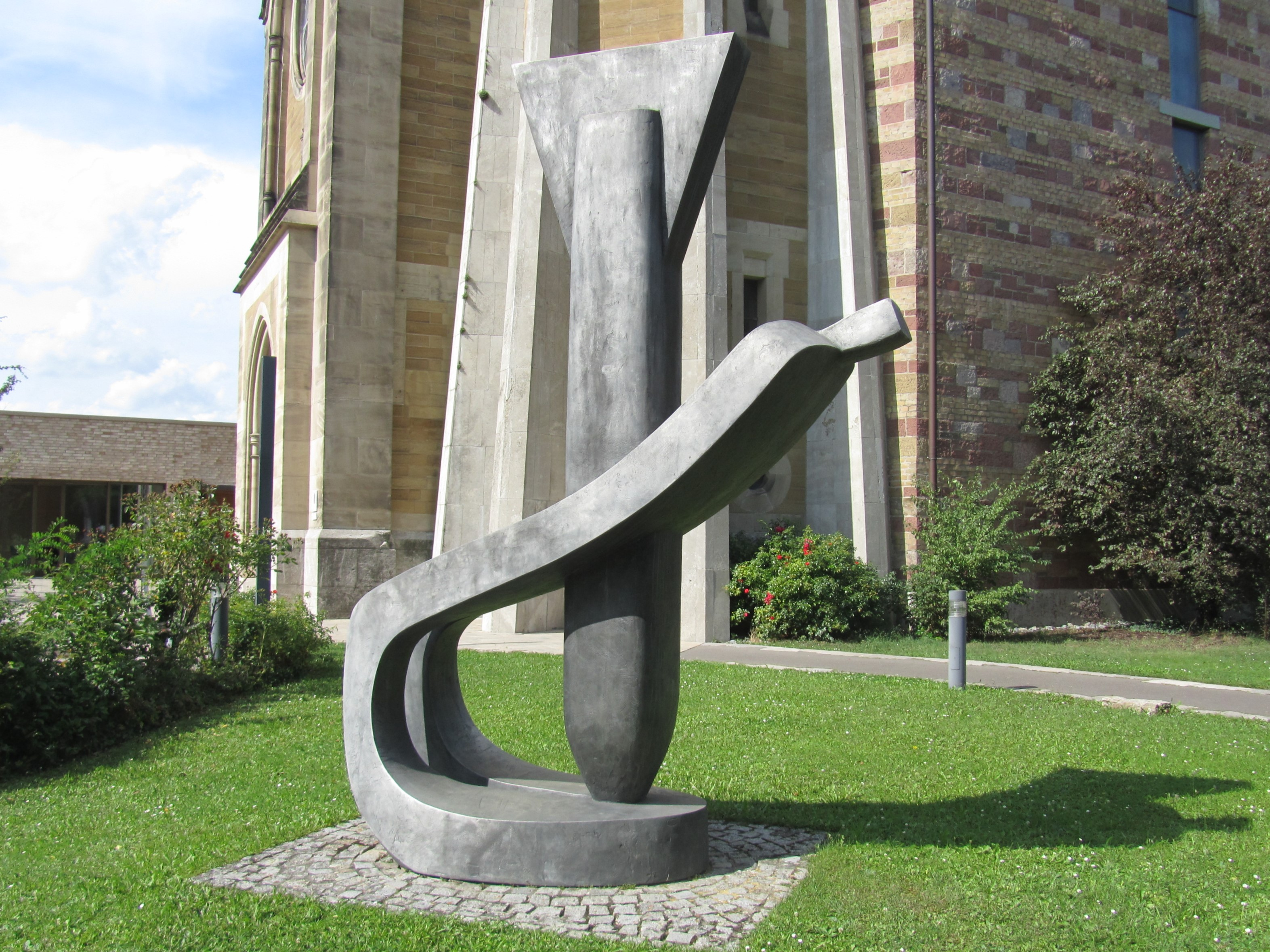 Vadim Sidur: Tod durch Bomben, vor der St.-Johannis-Kirche in Würzburg, Deutschland, aufgestellt 1974.